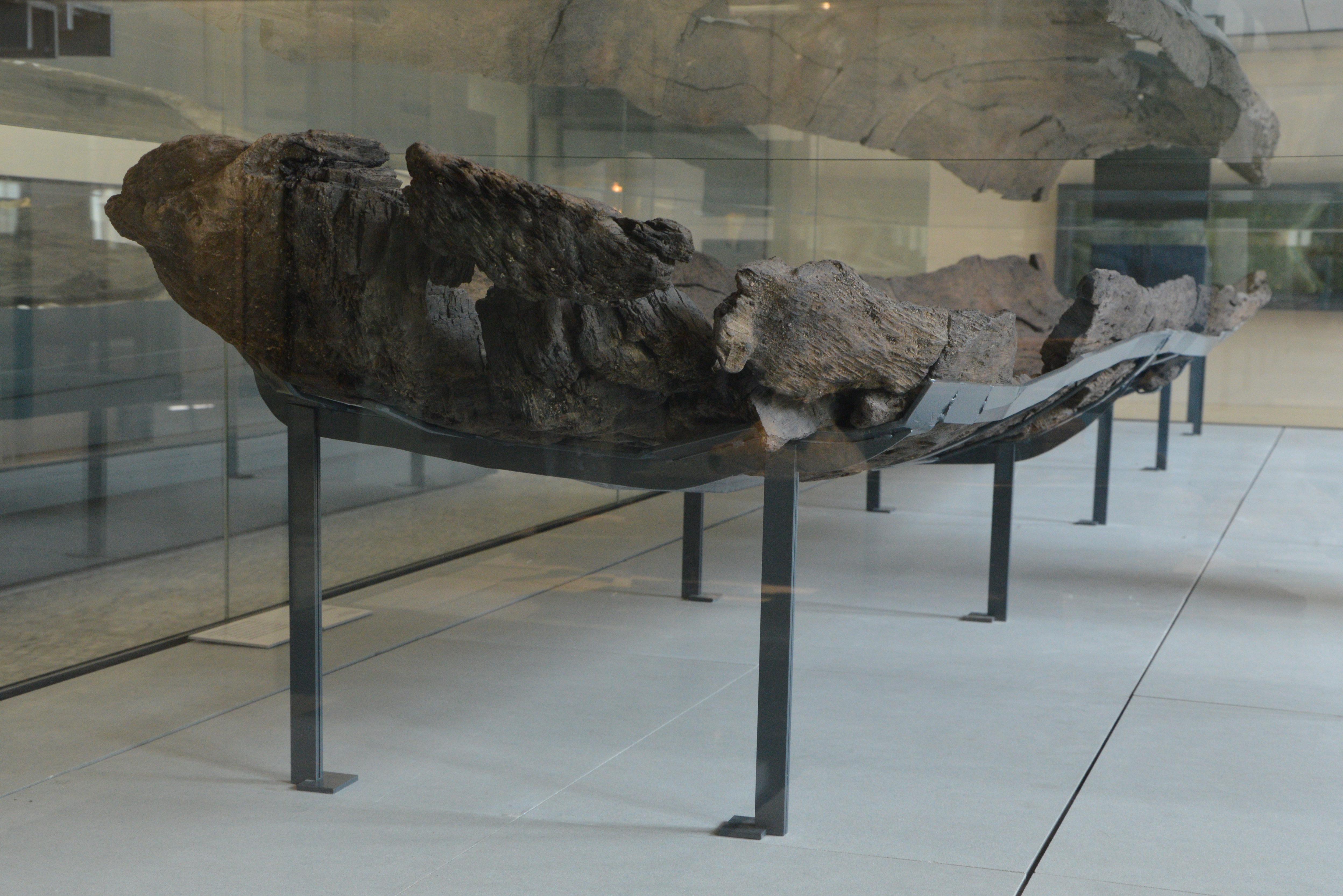 Pirogue monoxyle P03. Matériau : Chêne. Date de création : entre -2880 et -2500. Lieu de découverte : ZAC BERCY (Paris). Date de découverte en : 1991. Date d'acquisition : 2000. Dimensions : Largeurs : 90 cm / Longueur : 538cm / Épaisseur : 3cm. Inv : CARBERCYP03